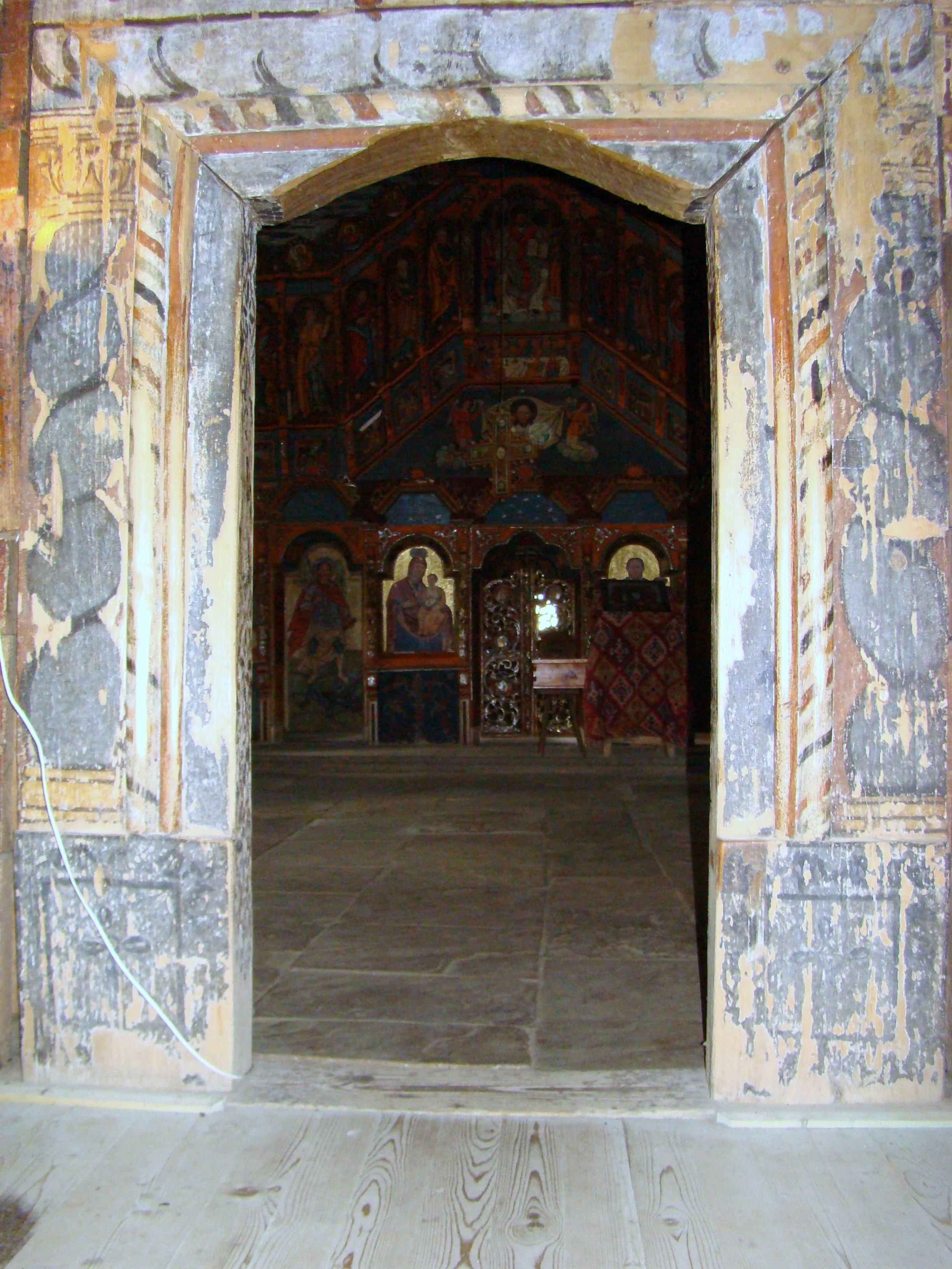 Biserica de lemn "Sfântul Nicolae", sat BOGDAN VODĂ